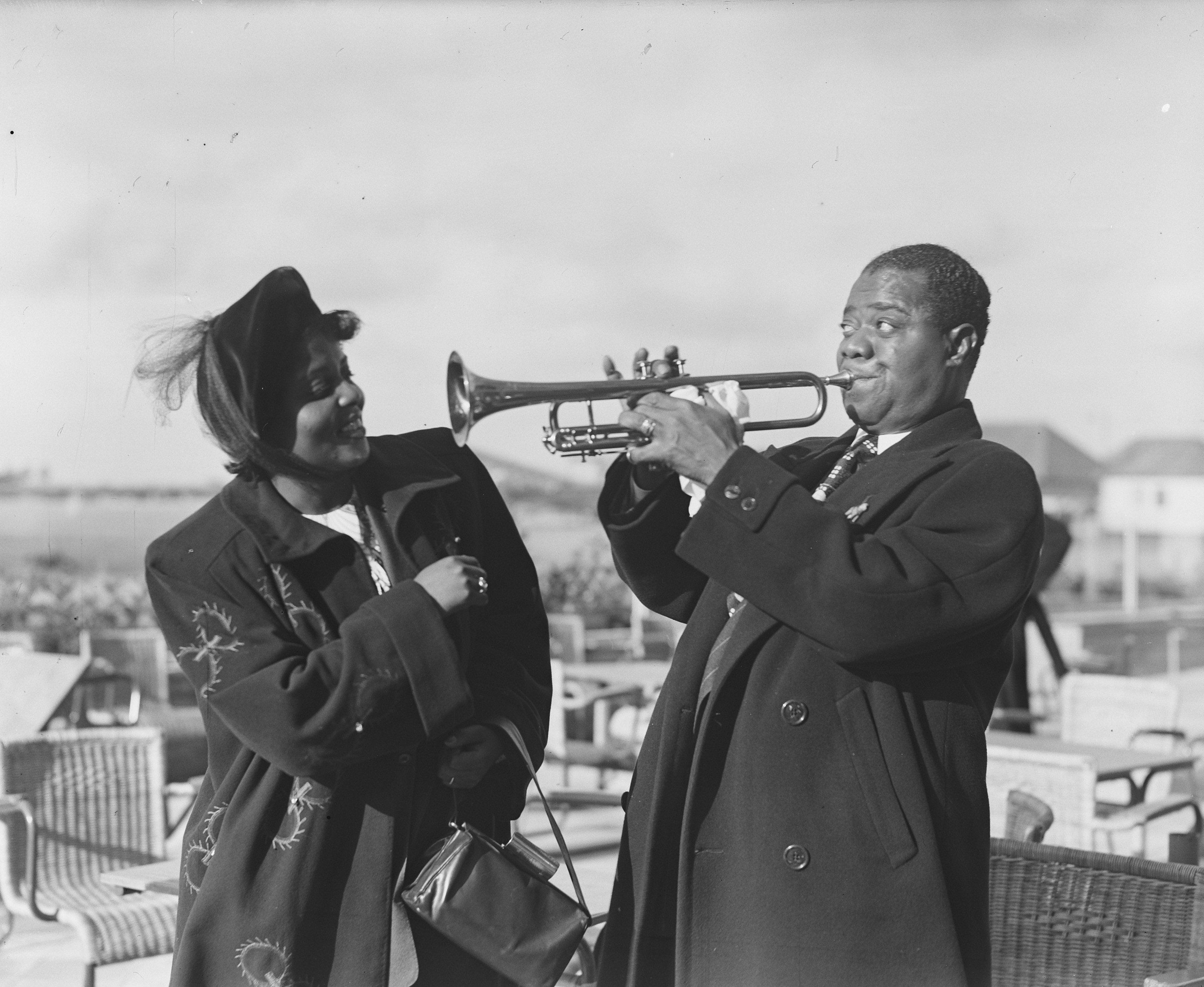 De band van de beroemde Amerikaan Louis Armstrong op Schiphol op doorreis van Denemarken naar België, Nederland 12 oktober 1949. Foto: Louis Armstrong demonstreert even op Schiphol dat hij nog spelen kan, naast hem zijn echtgenote Lucille Wilson.